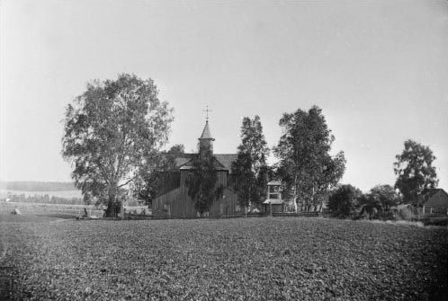 Беларуская (тарашкевіца): Засульле. Царква